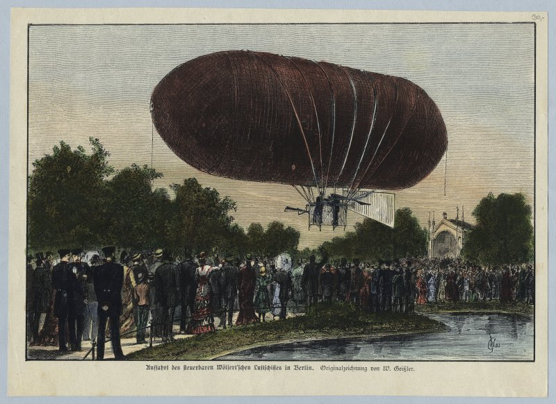 Kolorierter Holzstich mit dem Titel „Auffahrt des steuerbaren Wölfert'schen Luftschiffes in Berlin“ darunter die Ergänzung „Originalzeichnung von W. Geißler“ mit der Künstlersignatur „W.G.“ und der Jahreszahl „83“. Der Stich wurde in Schwarz-Weiß im Band 50 der Zeitschrift "Über Land und Meer" veröffentlicht. Maße: 18,8 x 28,4 cm (Darstellung) / 21,6 x 30 cm (Blatt)